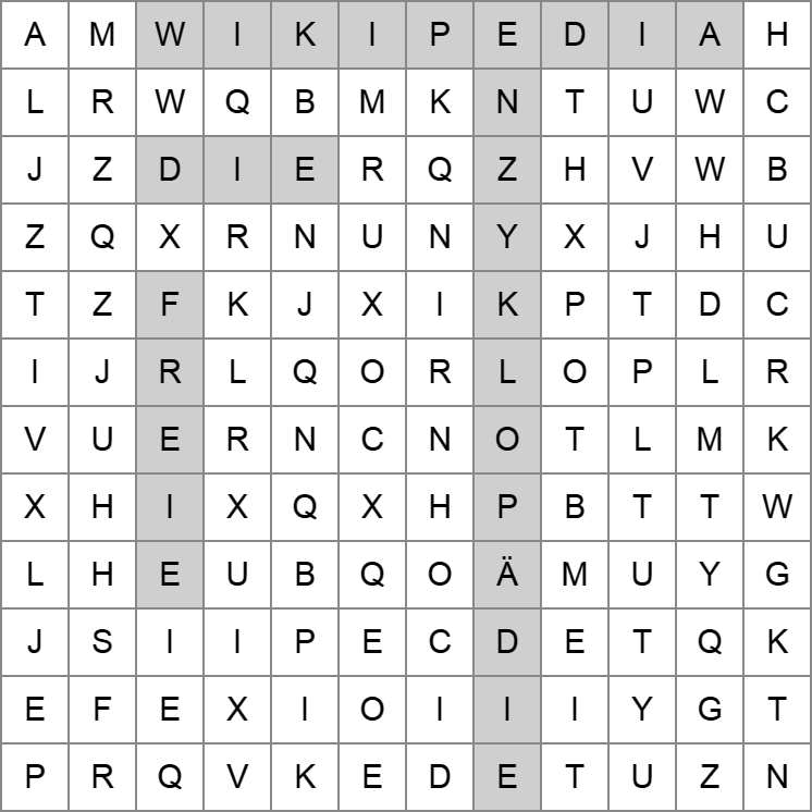 Ein Suchsel mit den versteckten (hier markiert) Wörtern "Wikipedia", "die", "freie" und "Enzyklopädie"